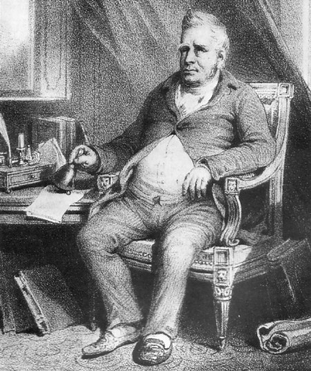 Afbeelding vervaardigd van koning Willem I der Nederlanden, in de maand van zijn overlijden (december 1843).